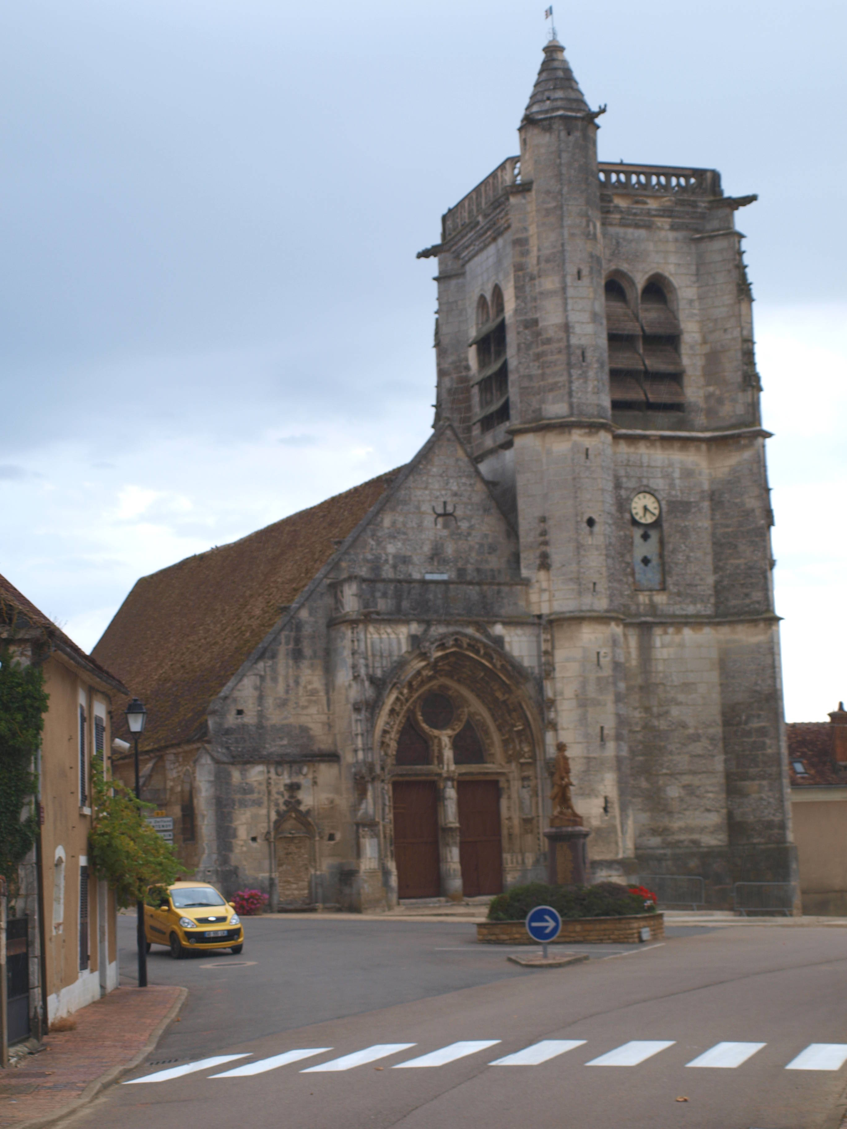 Thury (Yonne) - l'église.